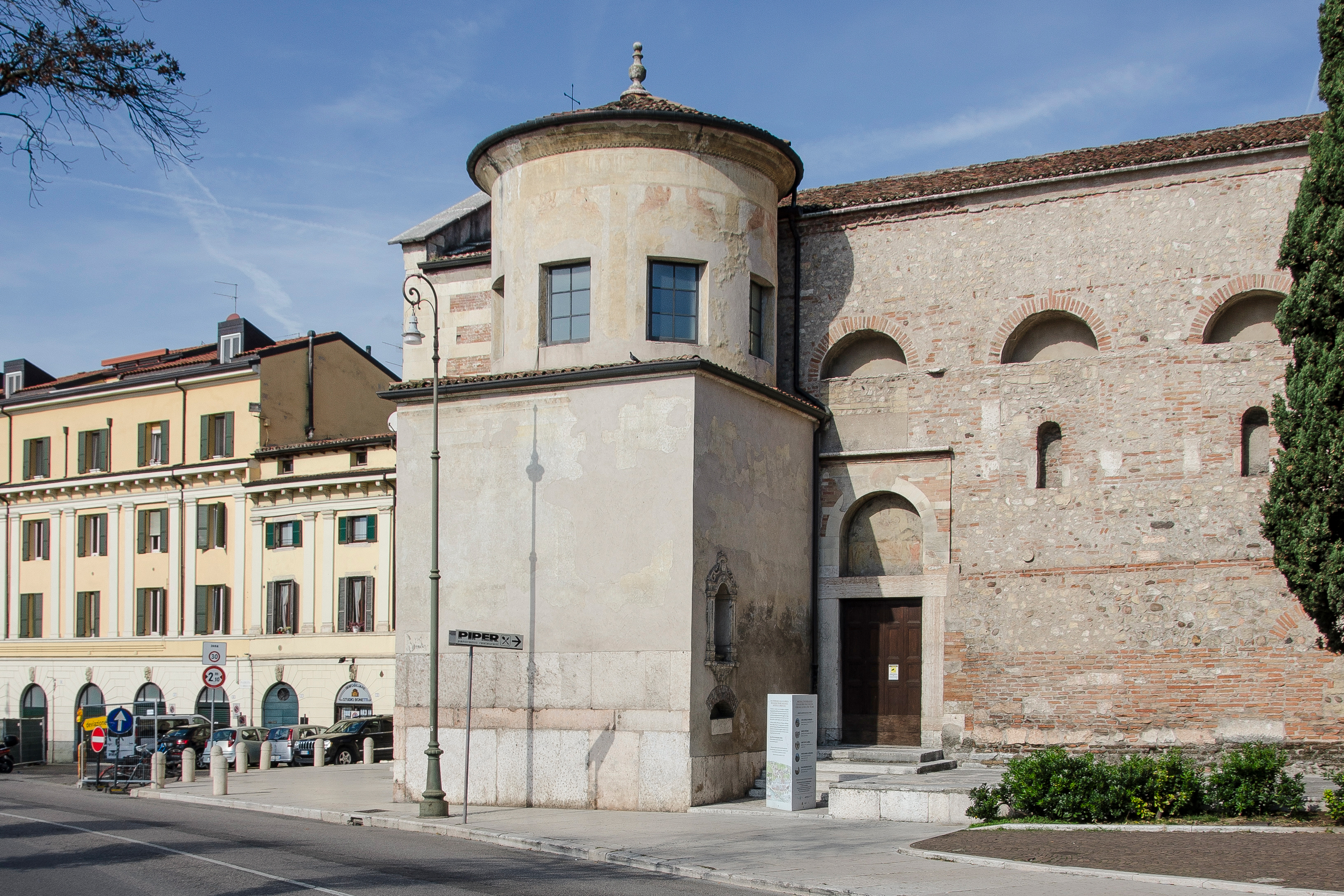 Fotografia dell'esterno